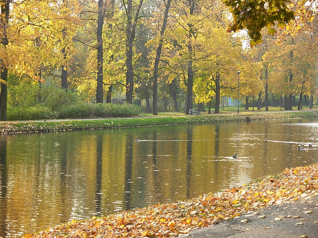 Planty nad kanałem bydgoskim